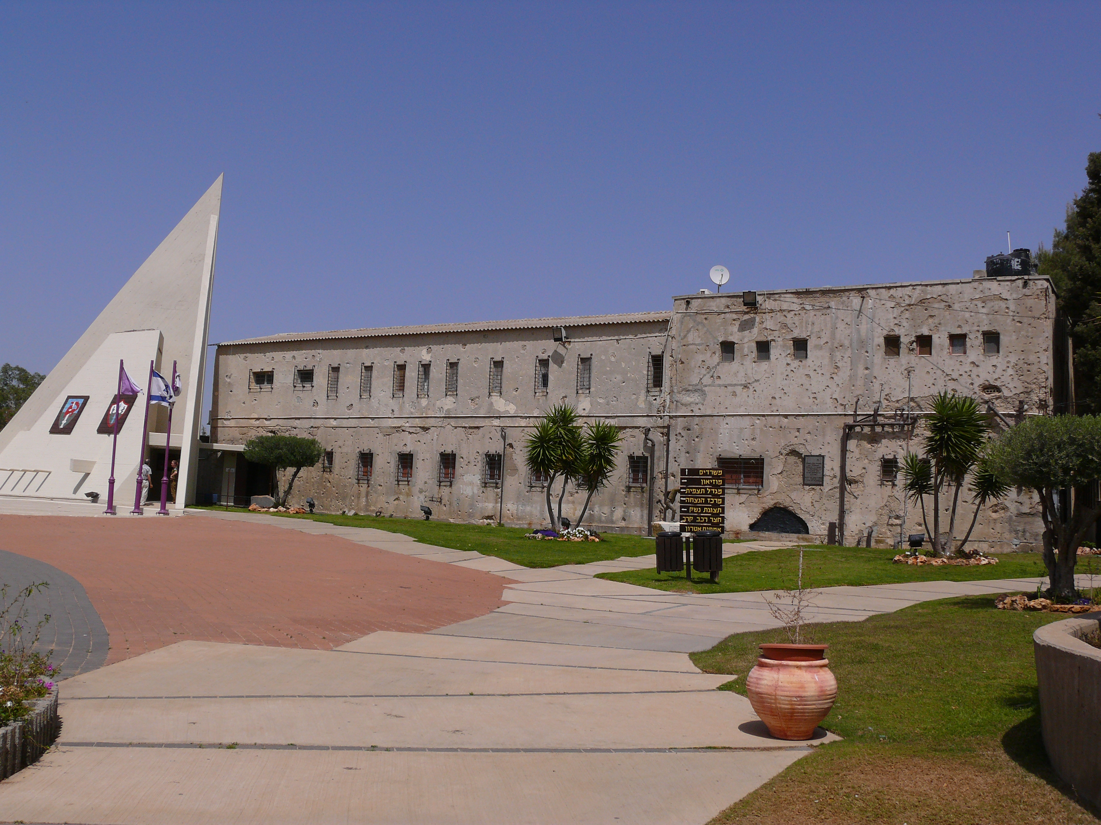 Metzudat Yoav מצודת יואב Givaty Museum מוזיאון גבעתי Israel ישראל